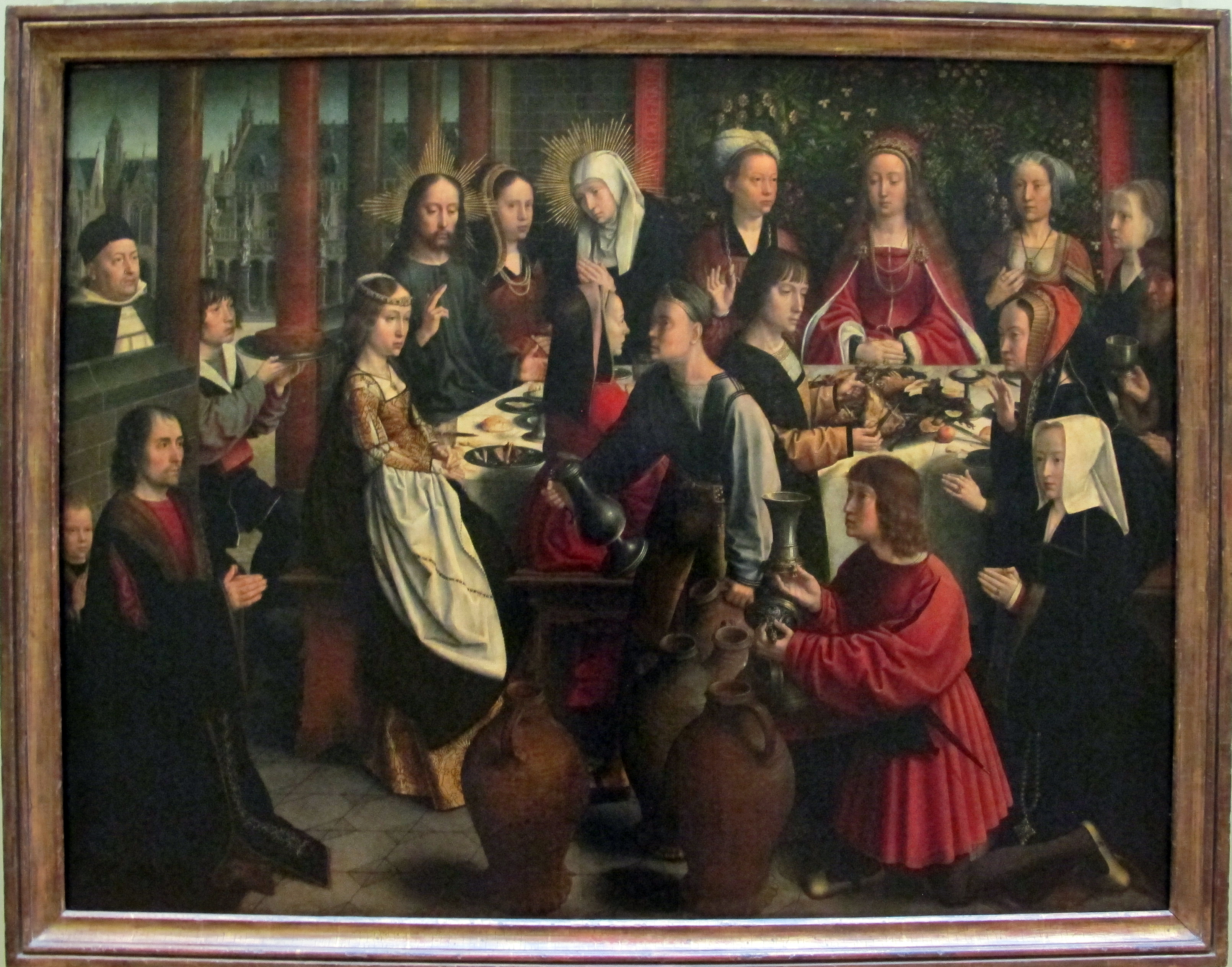 Dipinti fiamminghi del Quattrocento, Louvre, Parigi